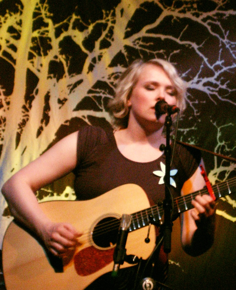 Ane Brun, Liveauftritt Hamburg 2008